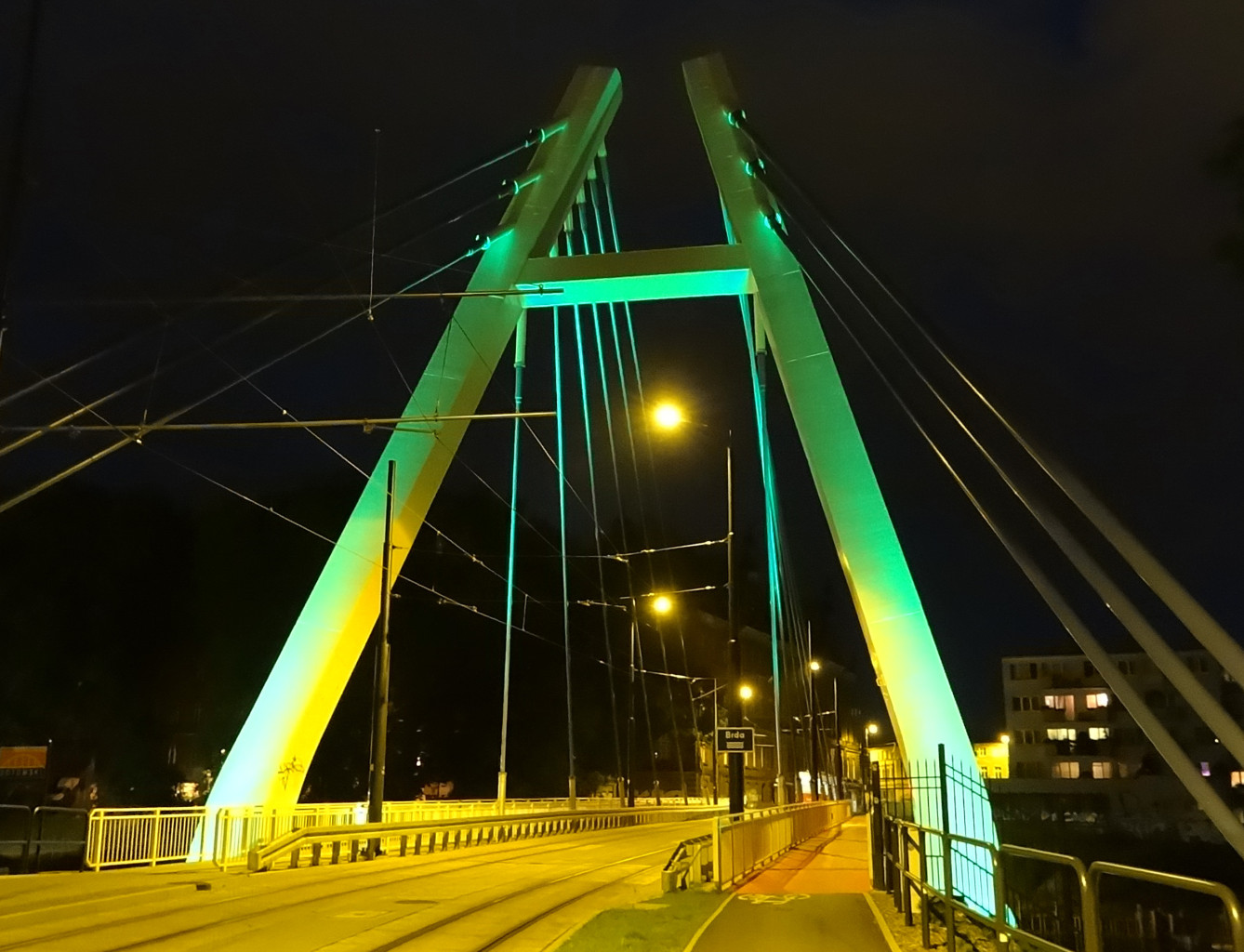 Most tramwajowy im. Władysława Jagiełły nad Brdą w Bydgoszczy